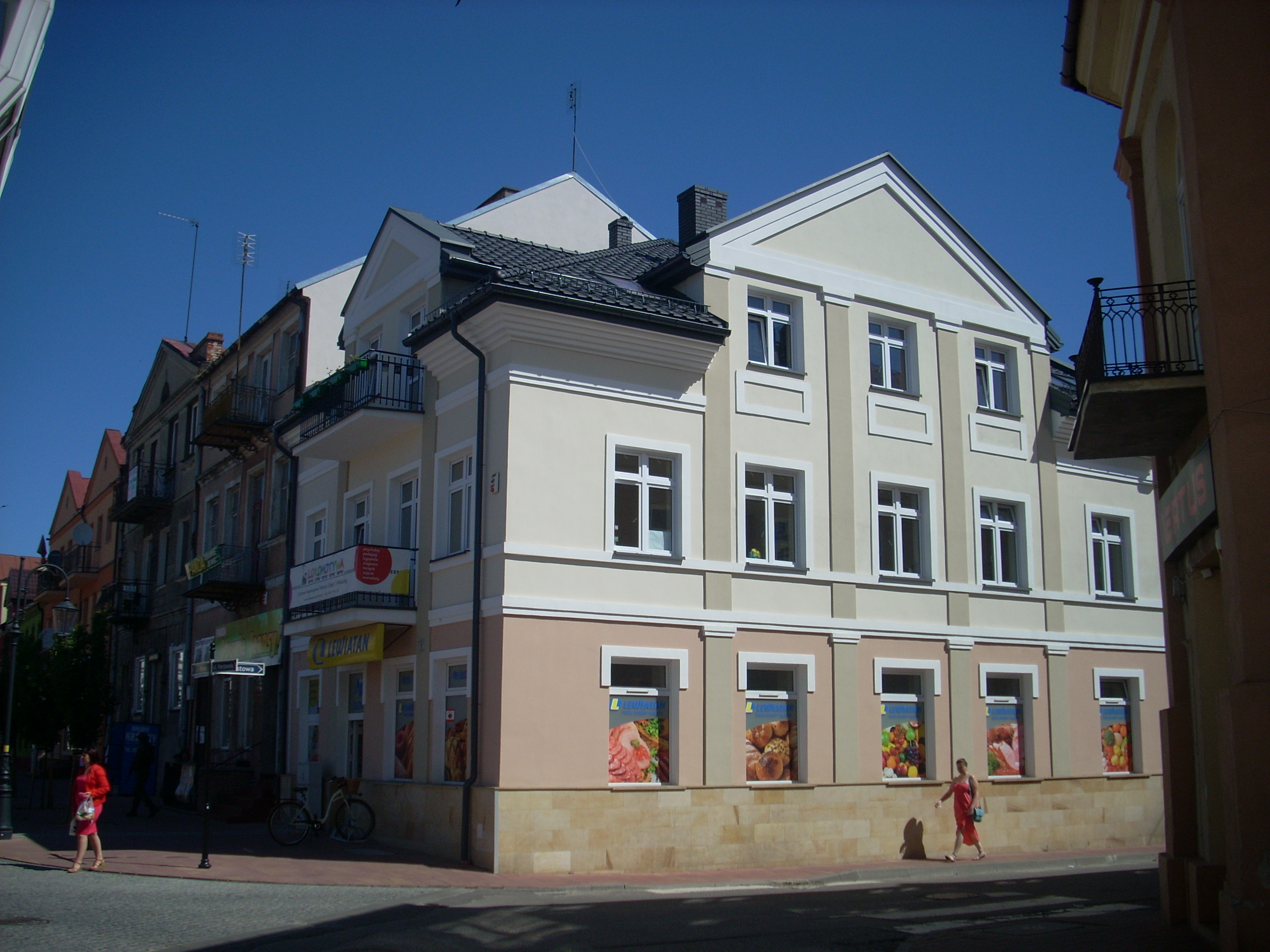 Zabytkowa kamienica u zbiegu ulic Warszawskiej i Mostowej w Przasnyszu